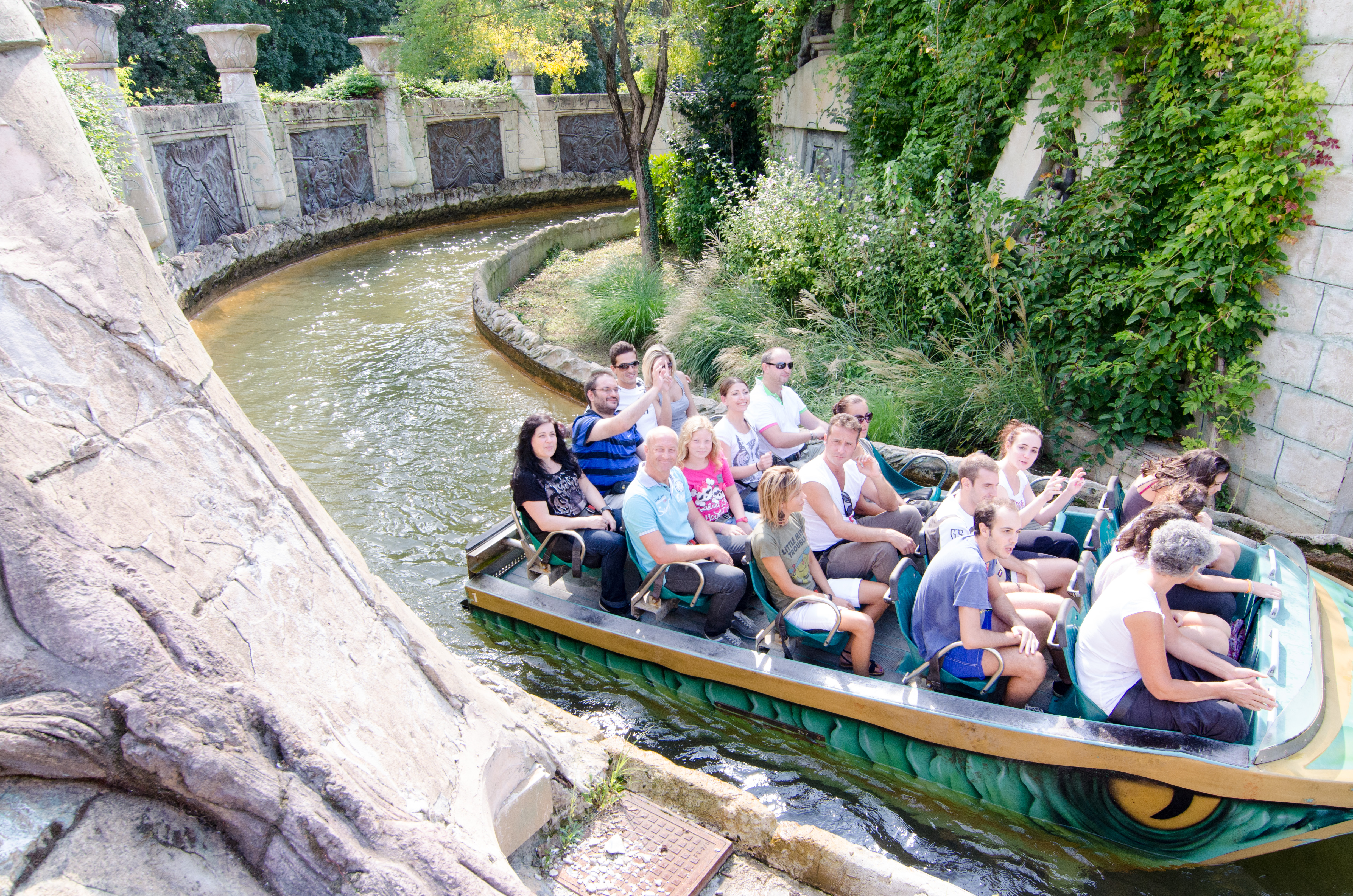 Ausflug 2013 20.09-22.09 2013